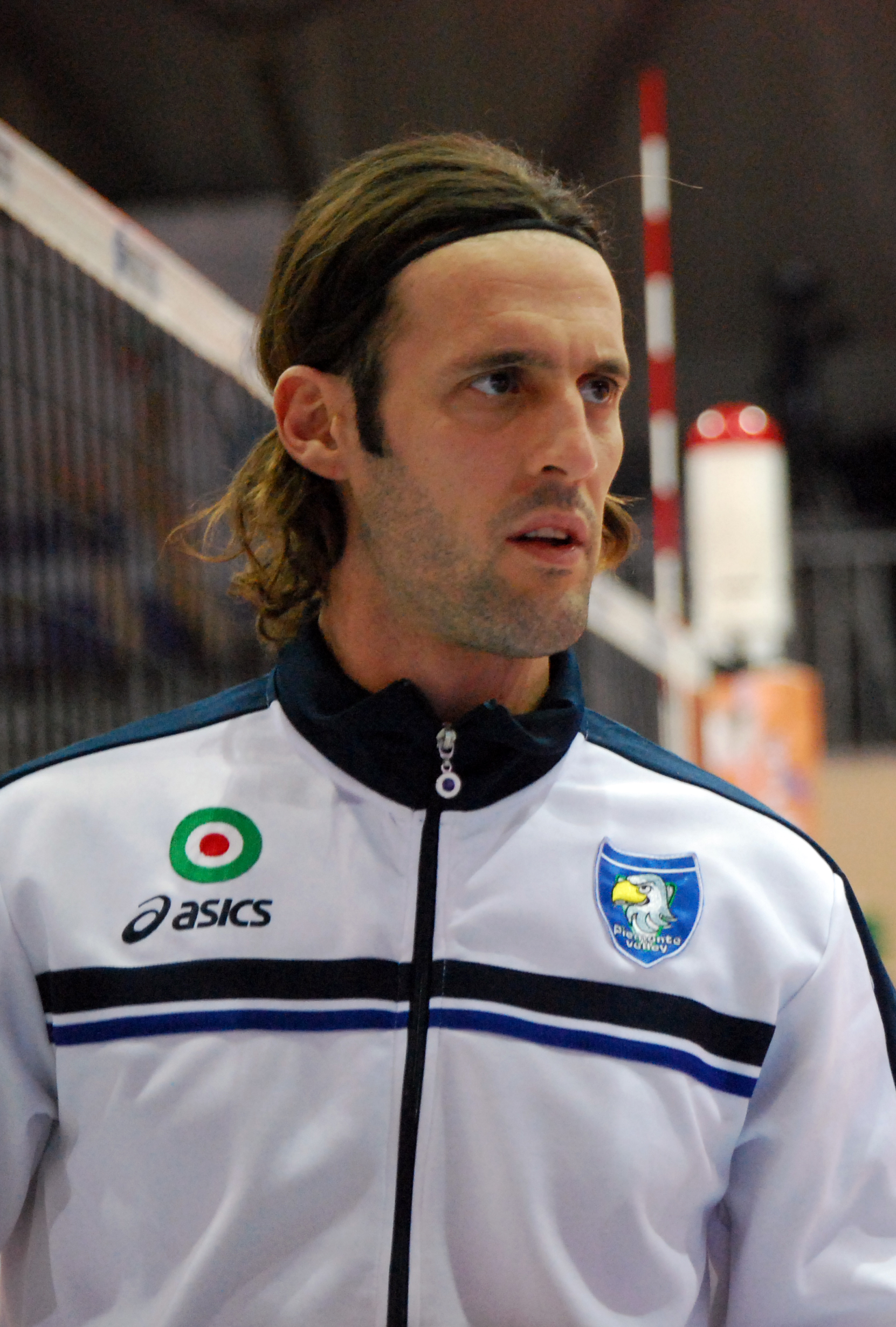 Giuseppe Patriarca in una partita di campionato